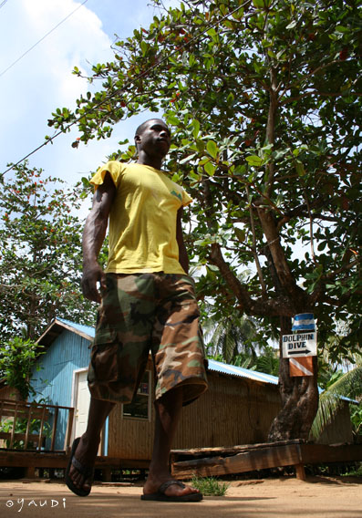 Habitante de Little Corn Island